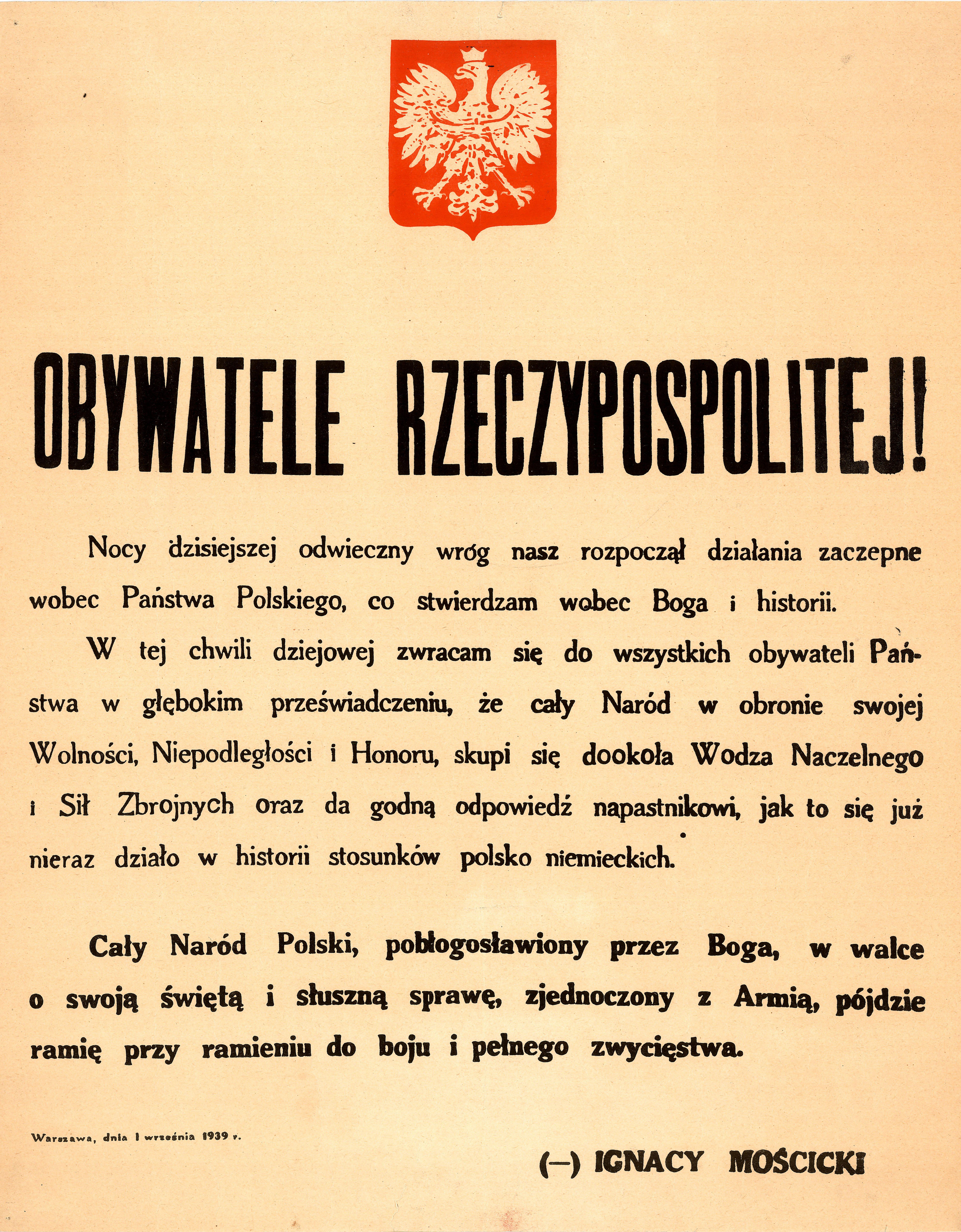 Orędzie Prezydenta RP Ignacego Mościckiego z 1 września 1939 roku.